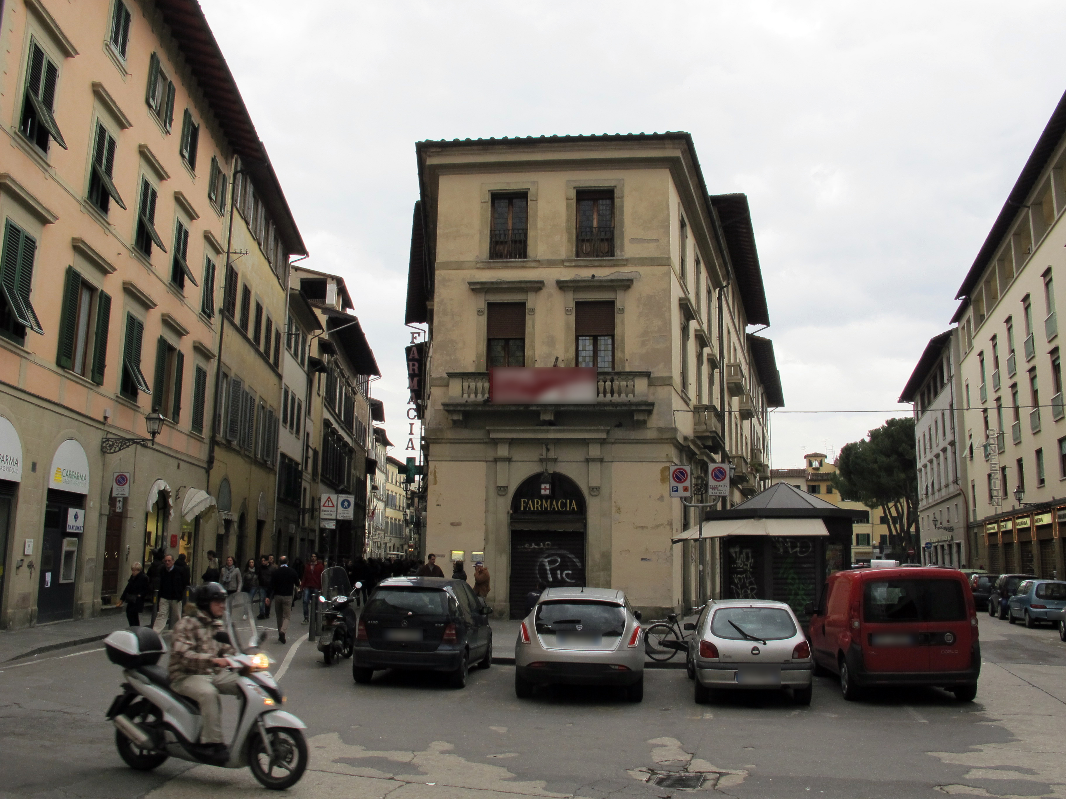 Via pietrapiana 51, nuova farmacia del canto alle rondini